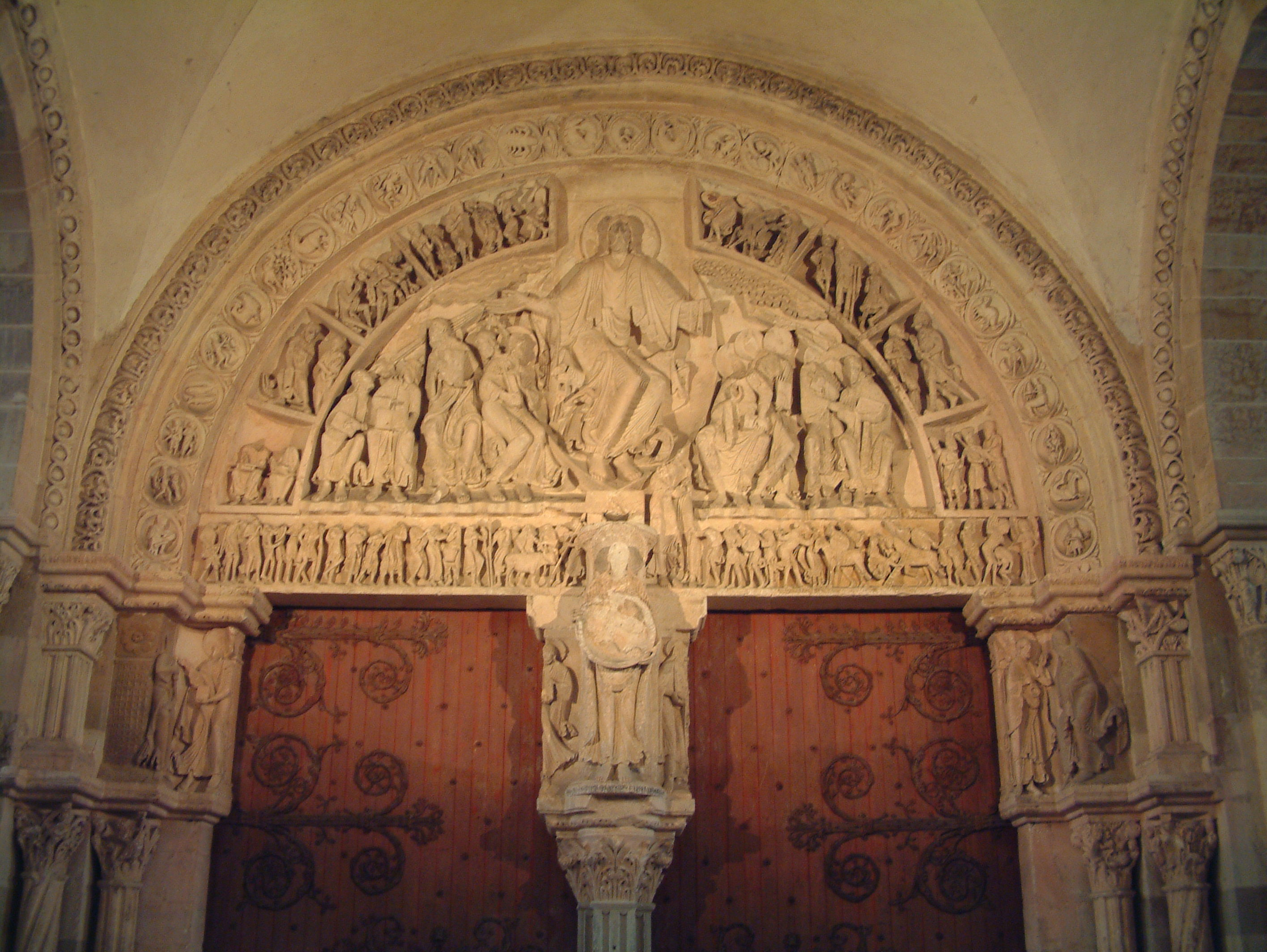 Vezélay - Timpà